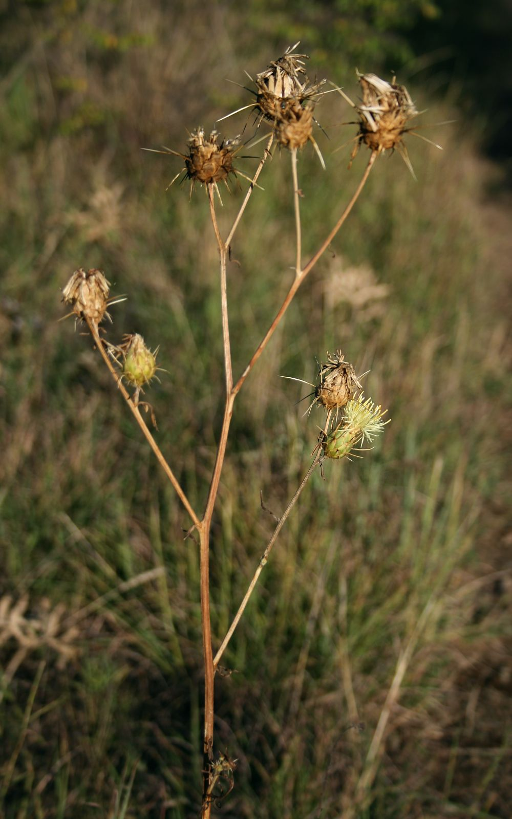 Centaurea reflexa subsp. reflexa, Korbblütler (Asteraceae) – Georgien/საქართველო: Tbilissi/თბილისი, SW Botanischer Garten, ca. 610 m s.m.